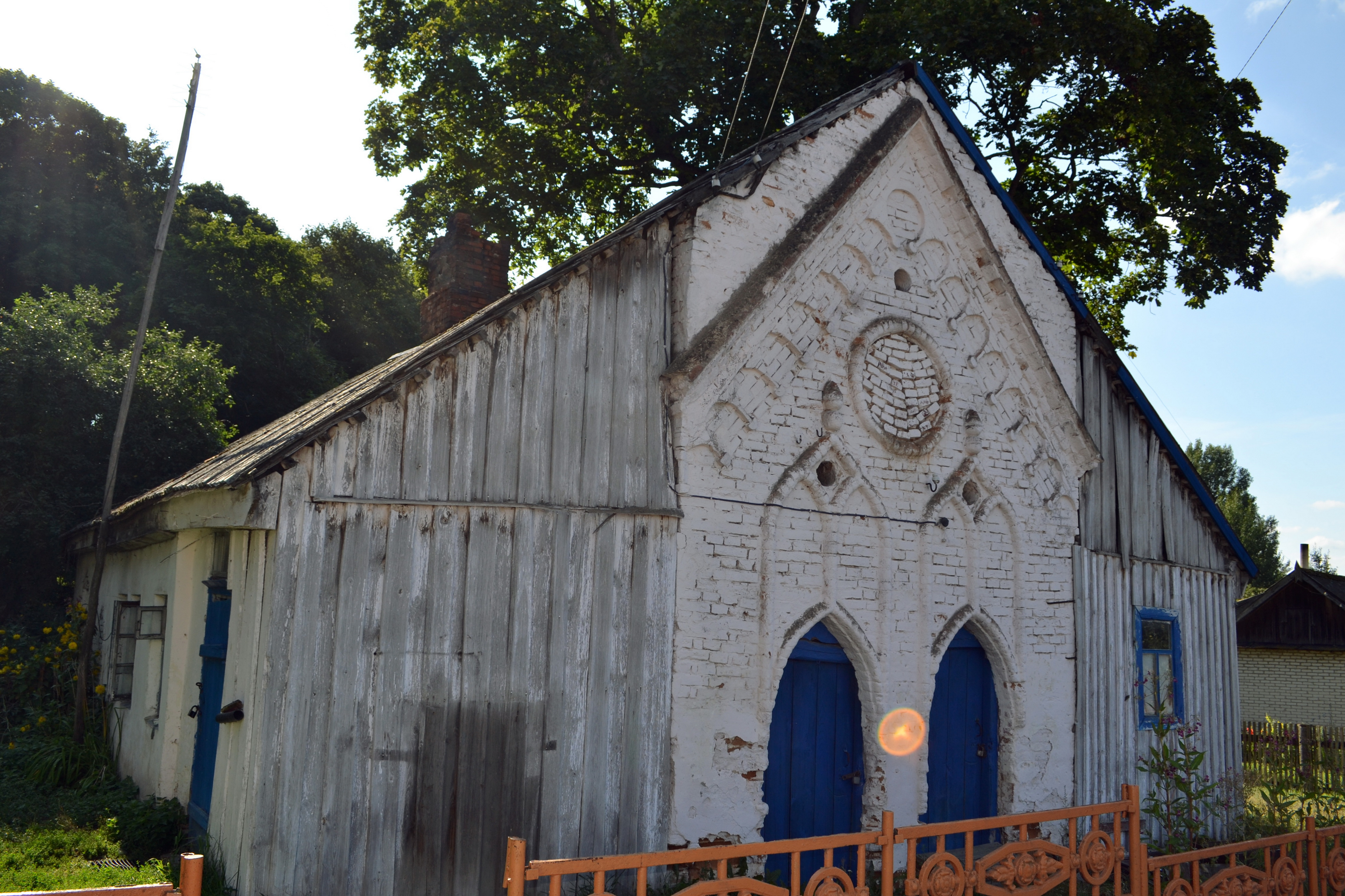 Беларуская (тарашкевіца): Белавусаўшчына. Былая сыраварня на тэрыторыі былой сядзібы другой паловы XIX стагодзьдзі